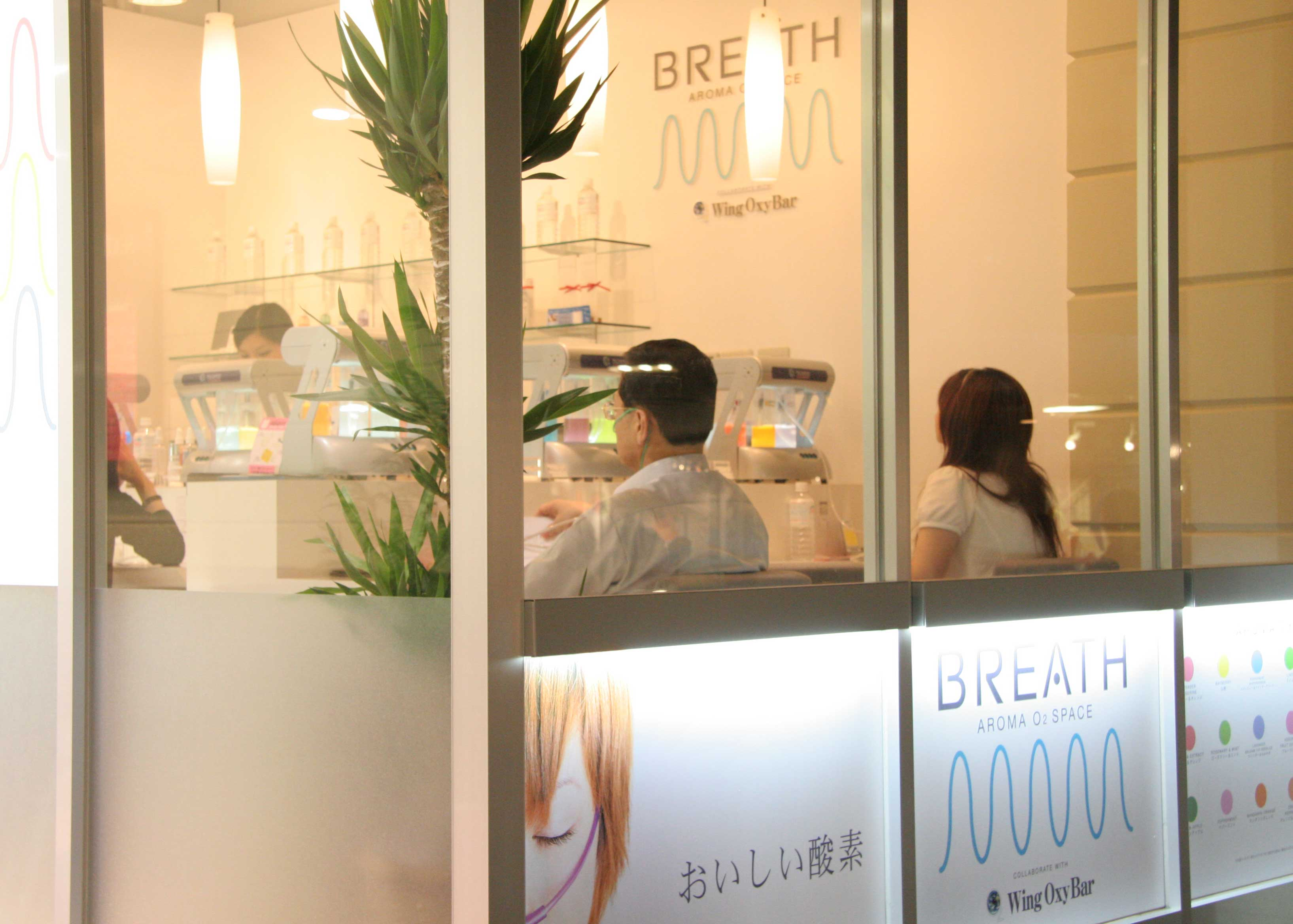 Oxygen bar in Tokyo, Japan.